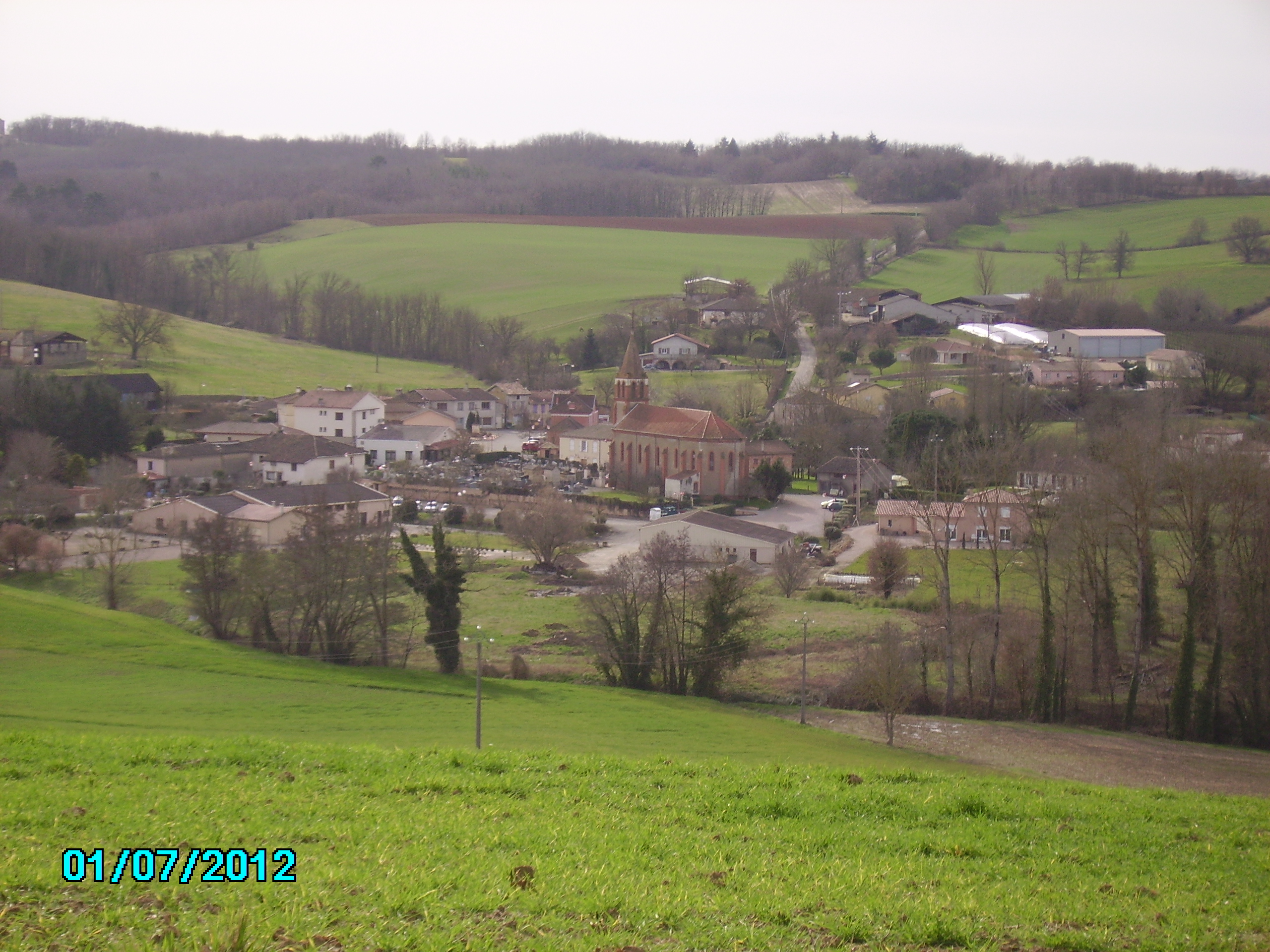 village de Vaïssac